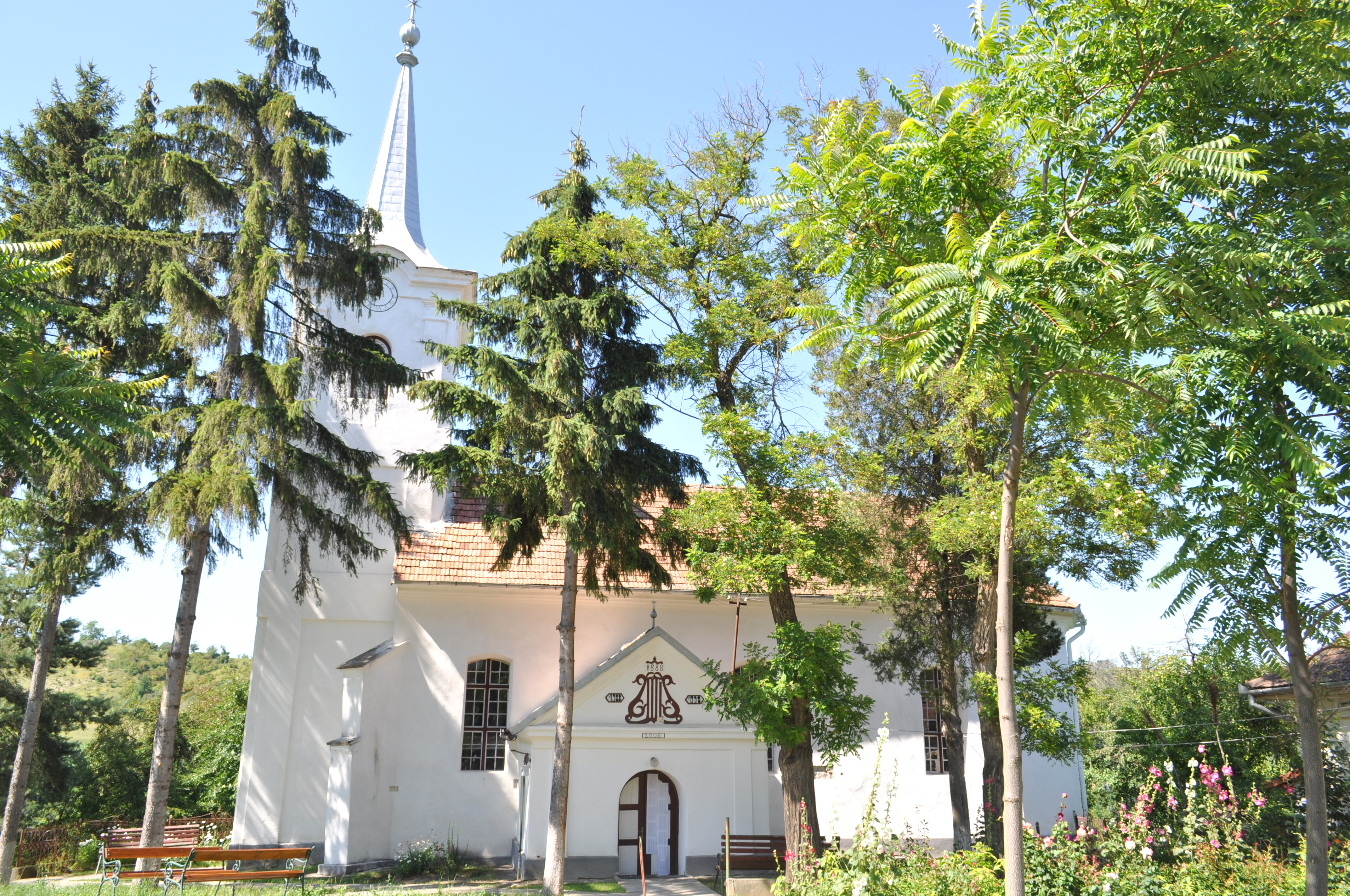 Biserica reformată, sat Papiu Ilarian; comuna Papiu Ilarian